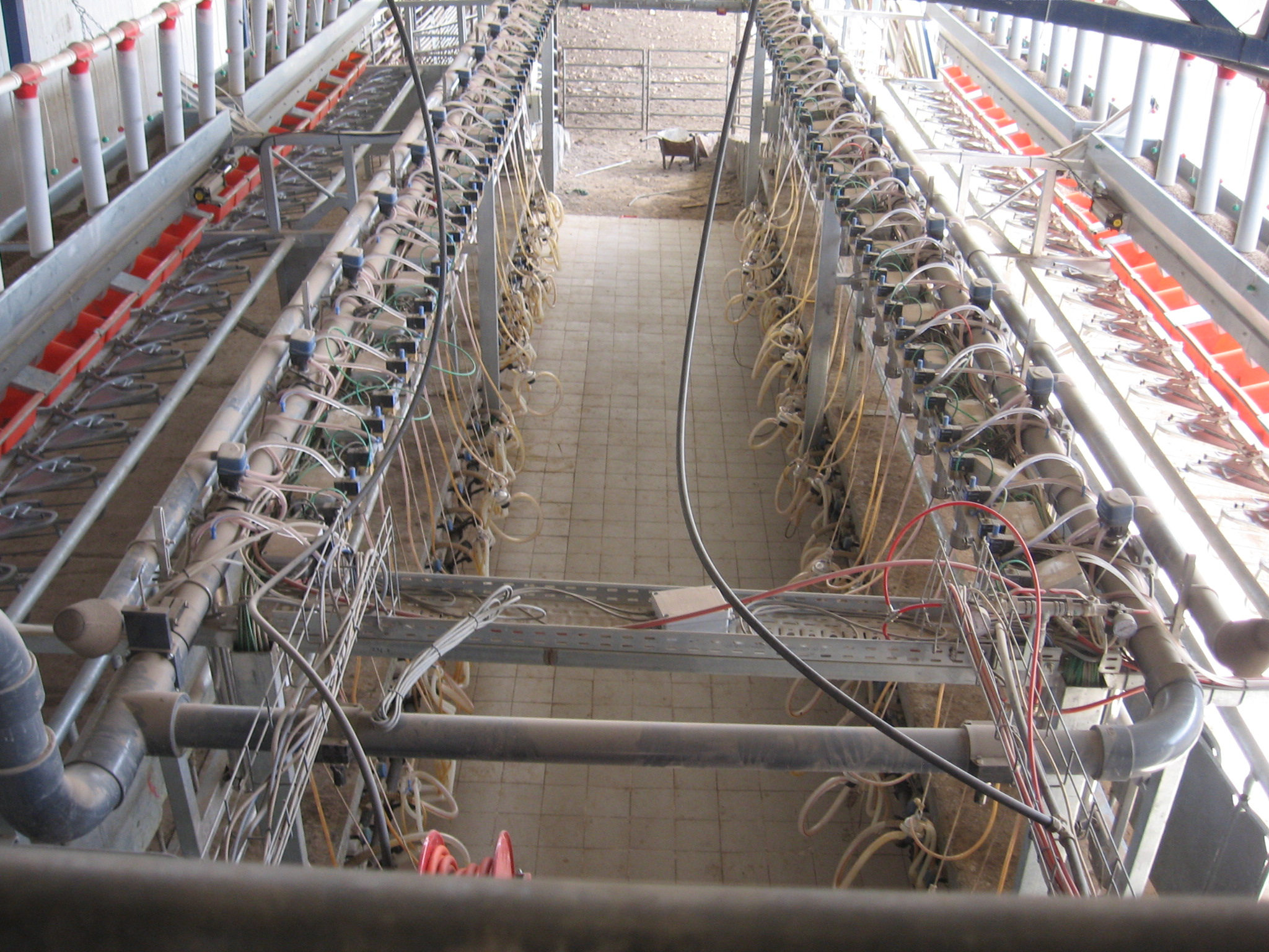 מחלבת דרומא בסוסיא